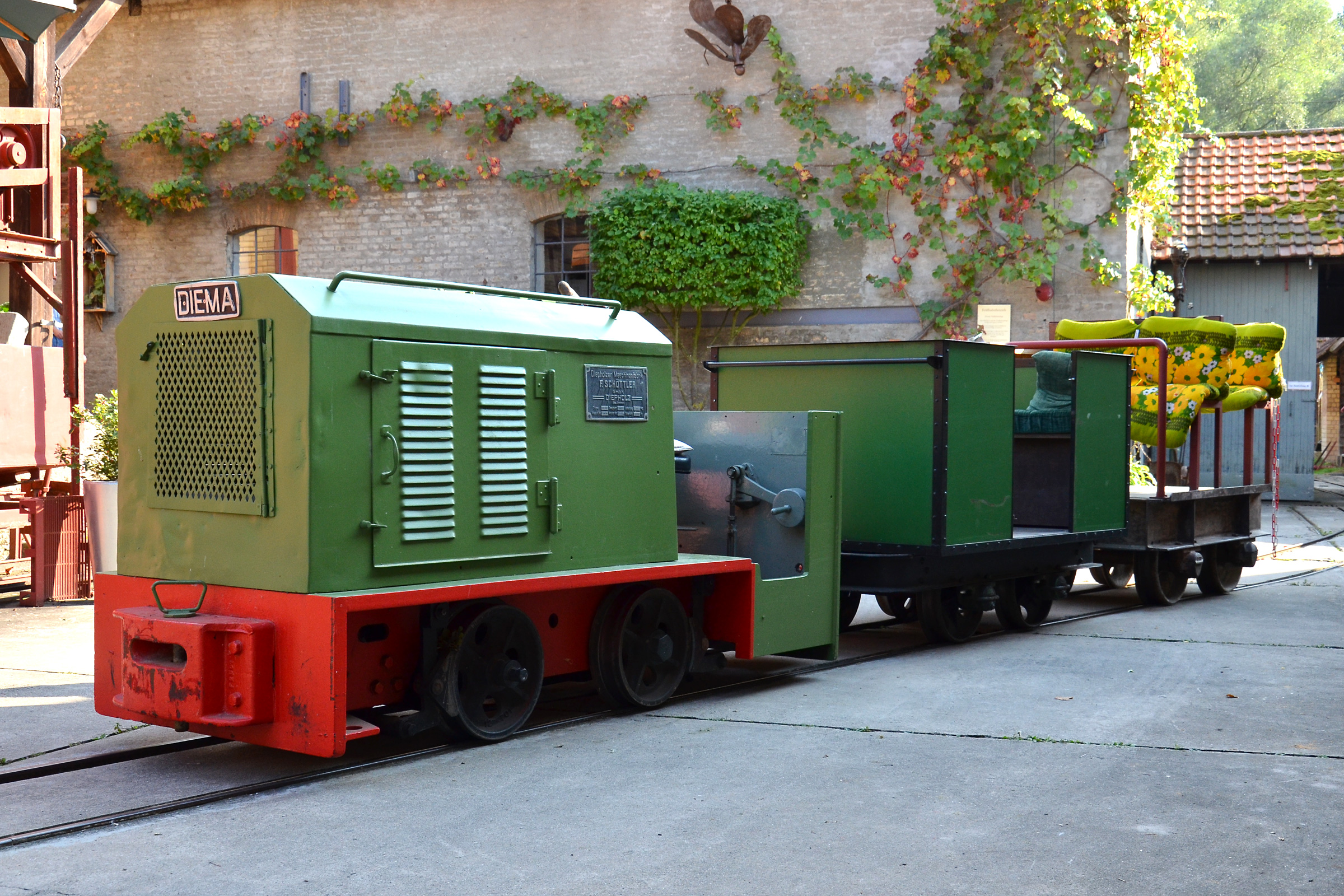 Ziegeleimuseum Sondernheim, Feldbahn Diema Baujahr: 1962